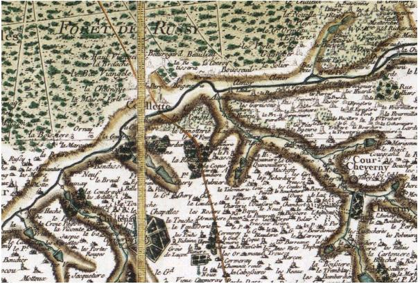 Extrait de la carte de Cassini 29, datée de 1753, centré sur la commune de Cellettes (Loir-et-Cher). Cote : Ge FF 18595 (29) BNF Richelieu Cartes et Plans Reprod. Sc 96/576 . - Carte levée à partir de 1753 par Miquel et vérifiée en 1759 par Le Roy des Carreaux et Le Roy de Boscroger. Gravée par Desbrulins, Dupain et Beauvais. 47e feuille publiée. Annonce de la parution prévue en mai 1760 dans les "Affiches de Paris", 3 janvier 1760, p.13-14 (B.N. Impr., V 28264).